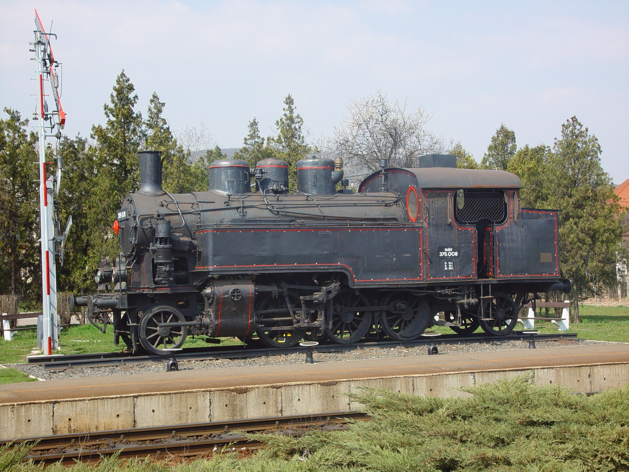 375-ös sorozatú gőzös, forgalomból kivonva, a csopaki állomáson (2001-ben a Magyar Vasúttörténeti Parkba költözött)